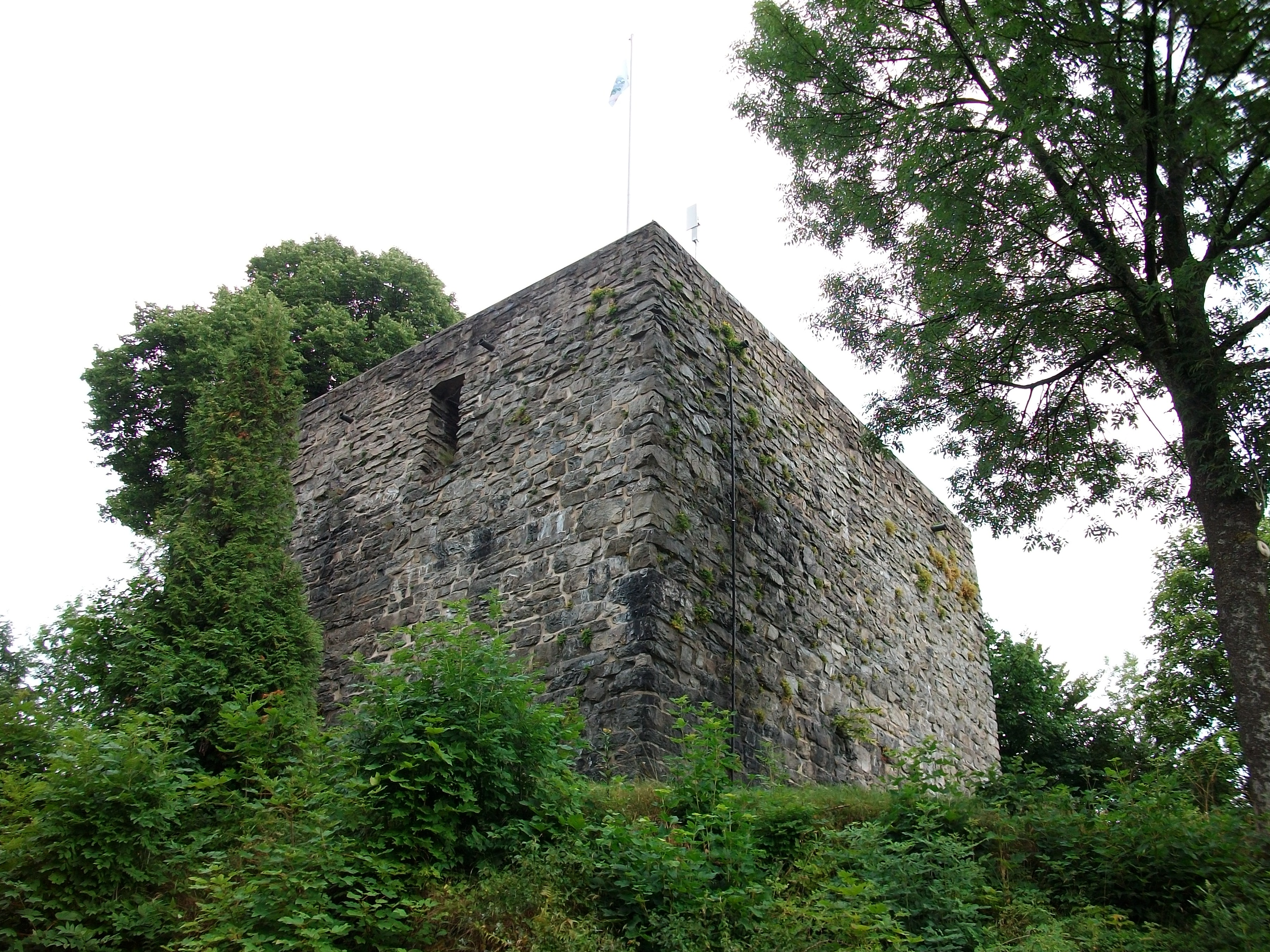 Burgruine Rappelstein, Schmallenberg (Germany)